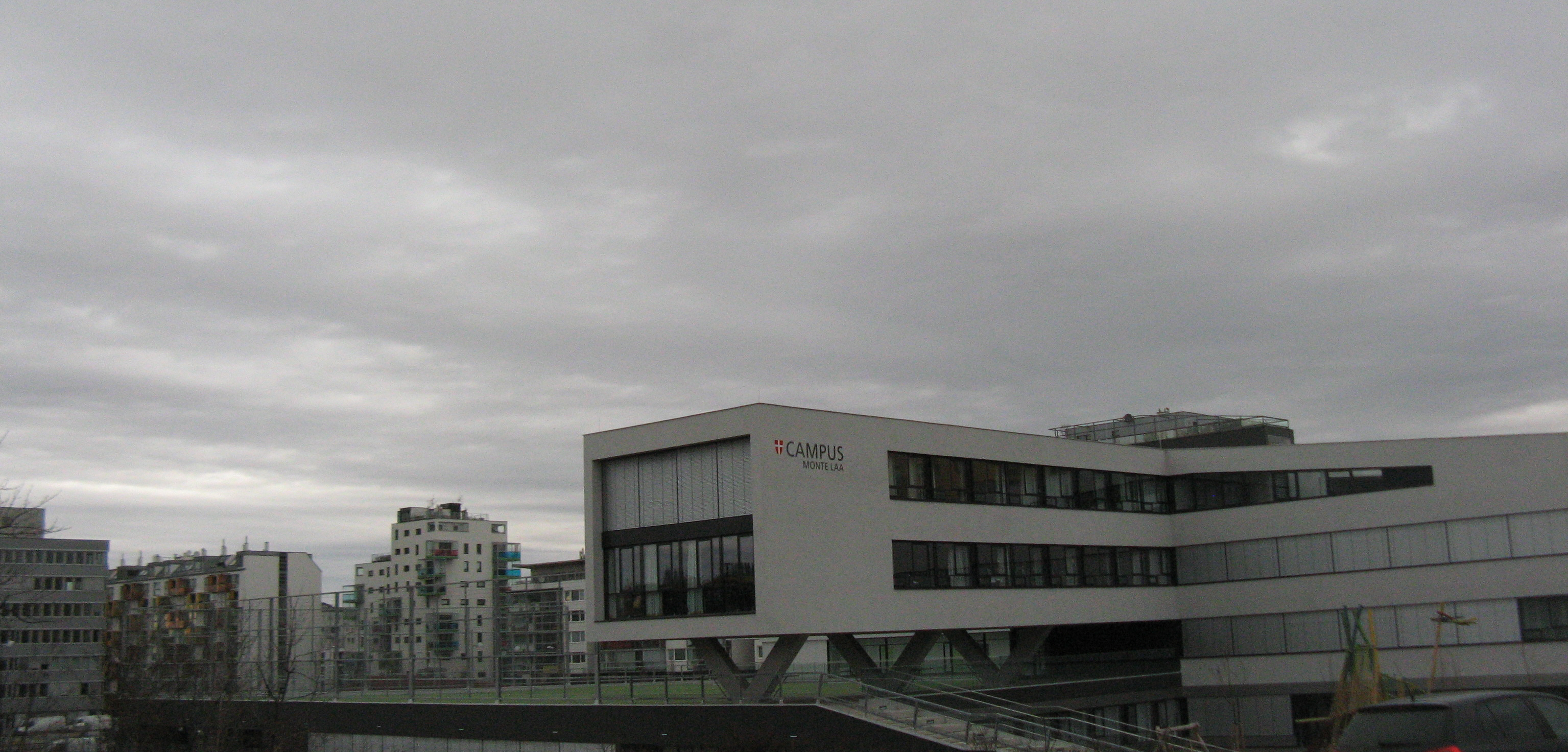 Campus Monte Laa, Laaer-Berg-Straße, Wien-Favoriten